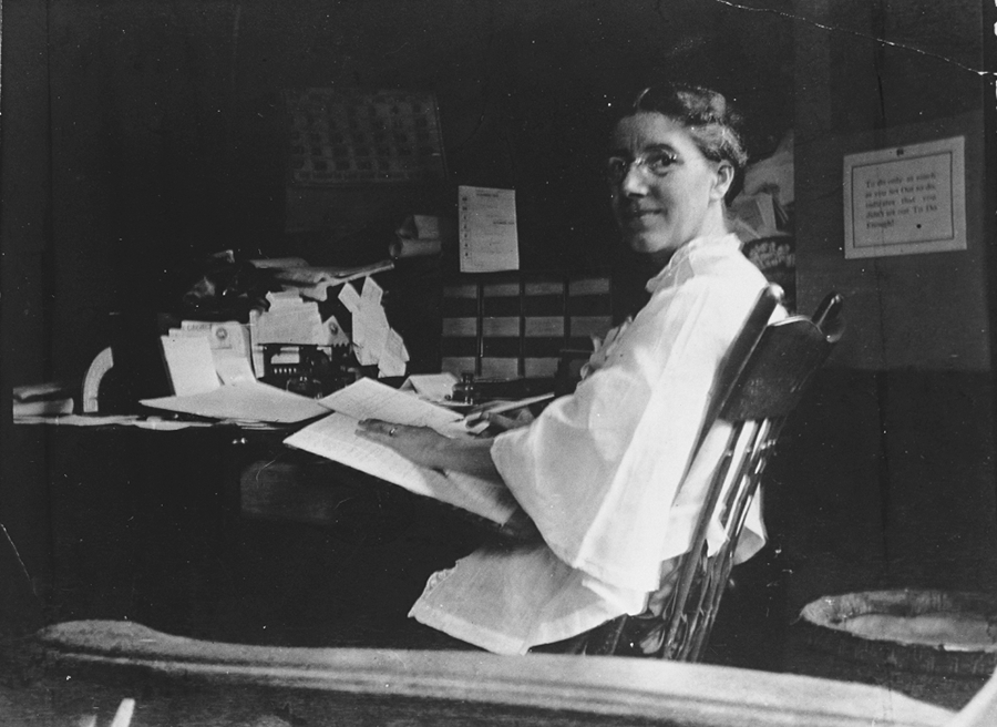 Adult Charlotte Perkins Gilman